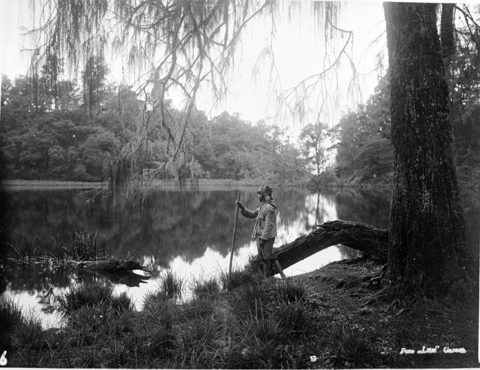 Foto. Ranoe Rewoelo in de buurt van Tosari.